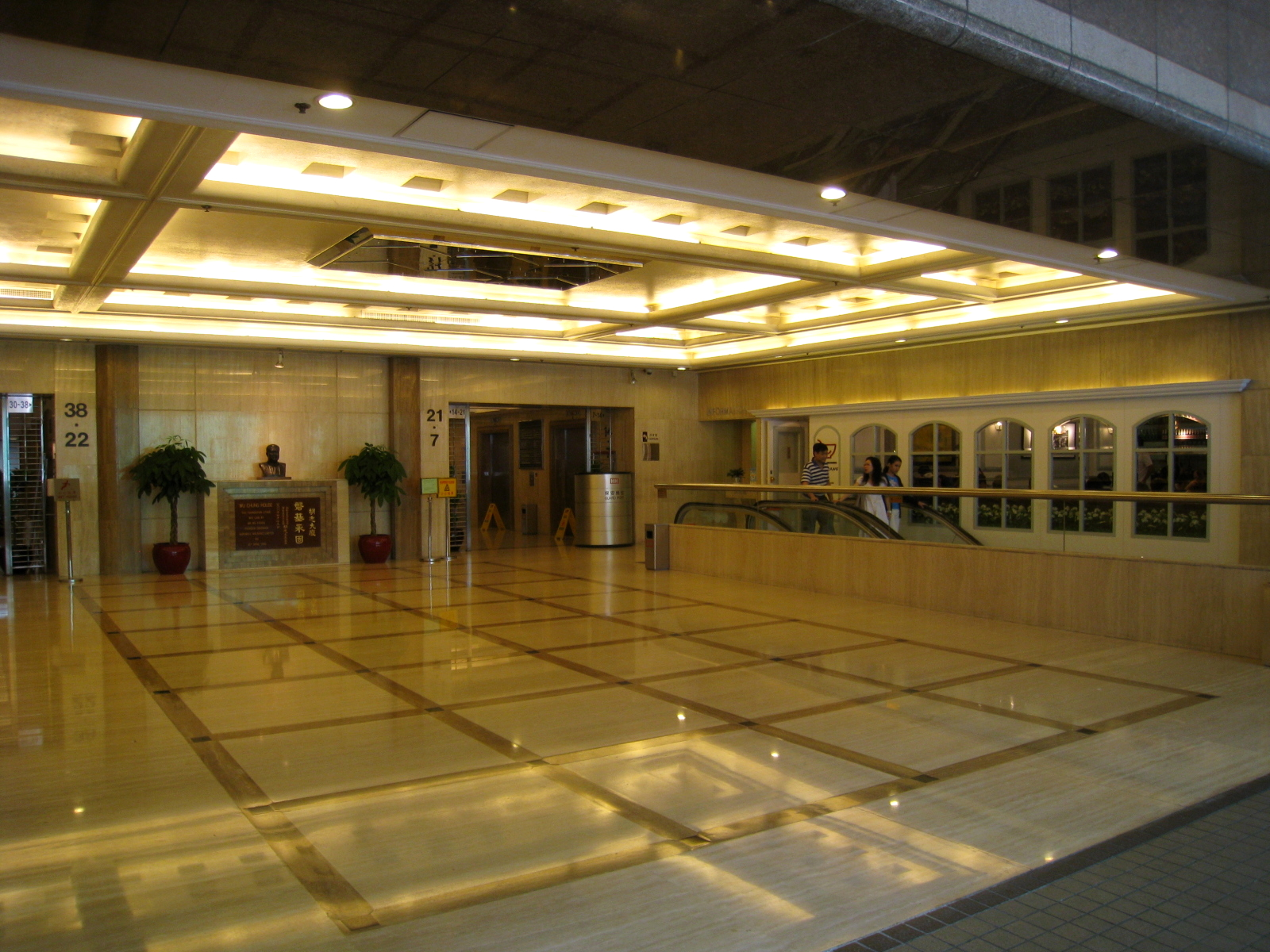 Wu Chung House 胡忠大廈